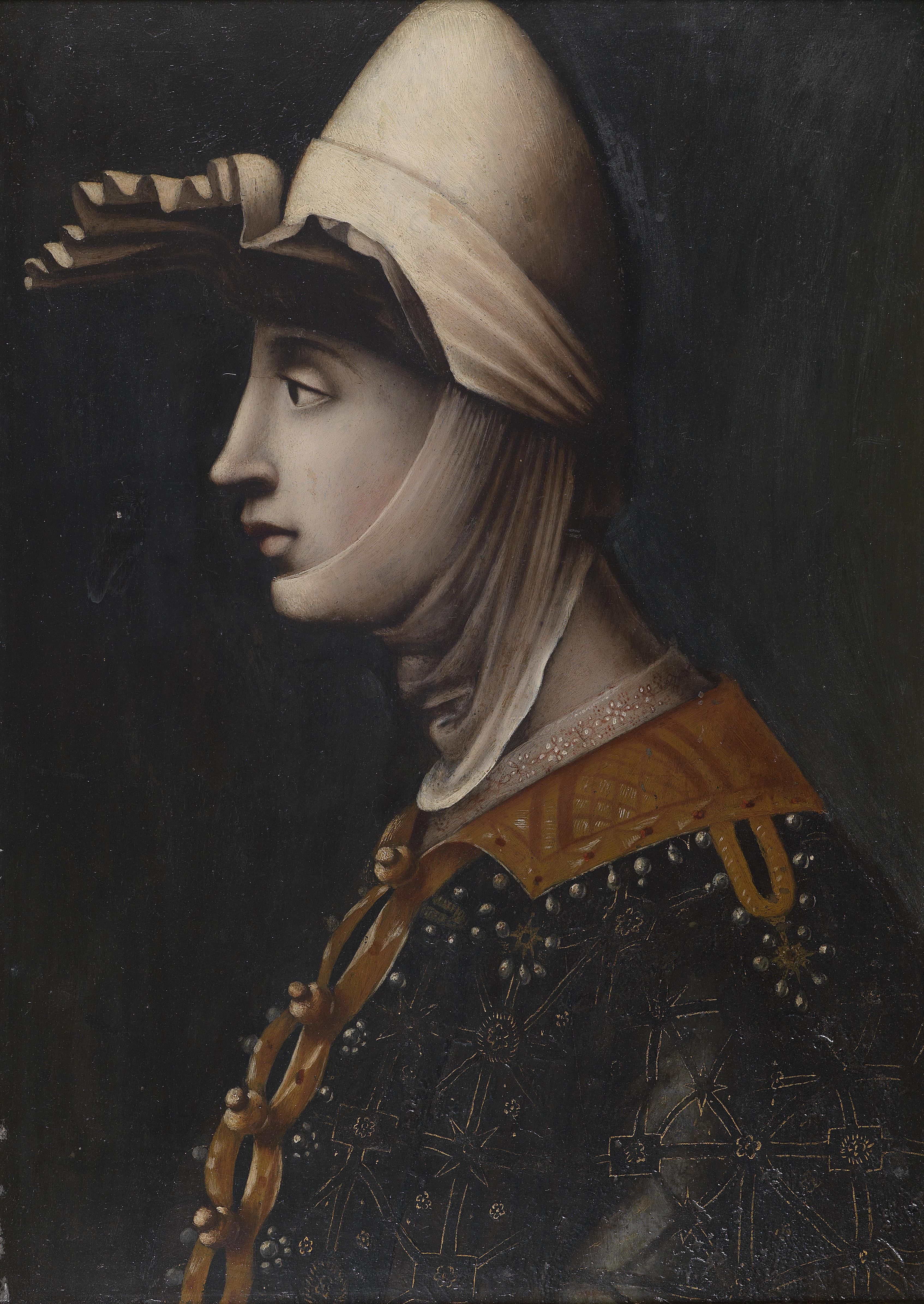 Mathilde von Tuszien († 1115), römische Schule der Mitte des 16. Jahrhunderts, Öl auf Schiefer, 49,5 x 36 cm. Motiv möglicherweise eine Erfindung des frühen 16. Jahrhunderts oder nach einem verlorenen Prototyp aus dem Hochmittelalter.